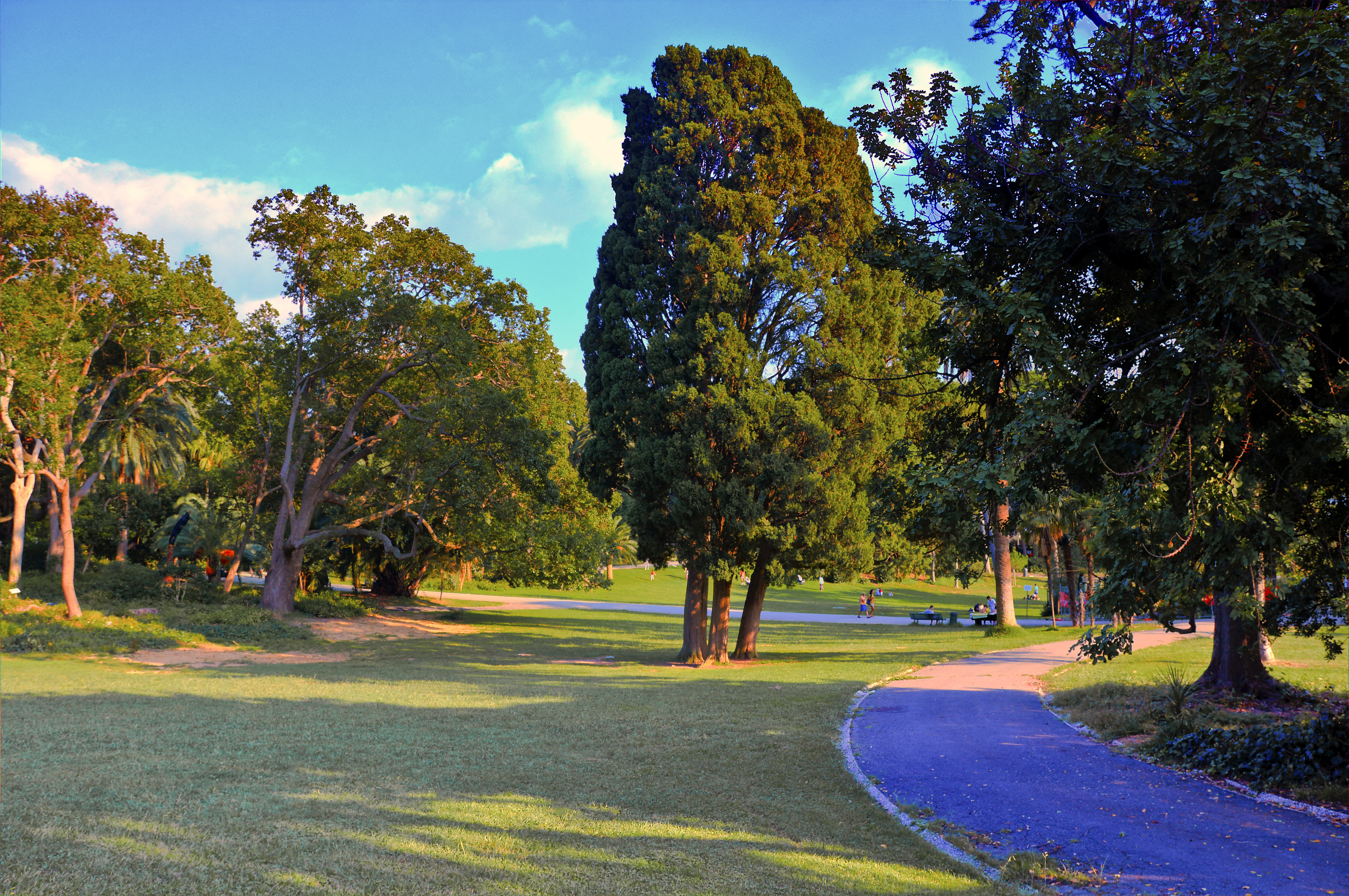 Il parco e i musei di Nervi This is a photo of a monument which is part of cultural heritage of Italy.